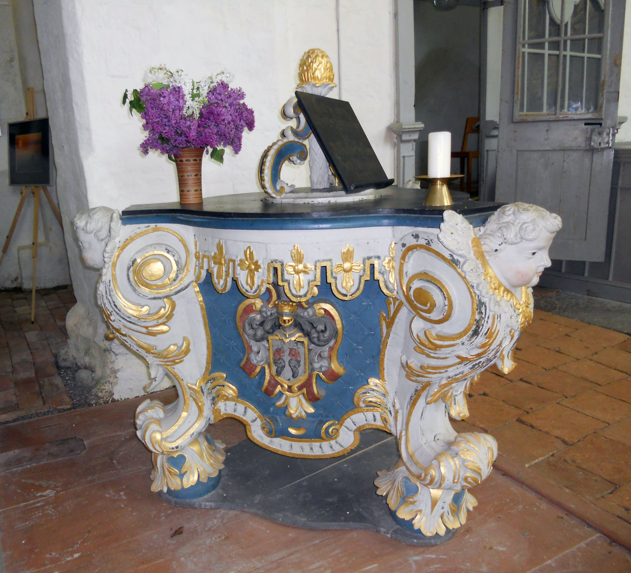 Heutiges Taufbecken der Kirche, Trent, Rügen